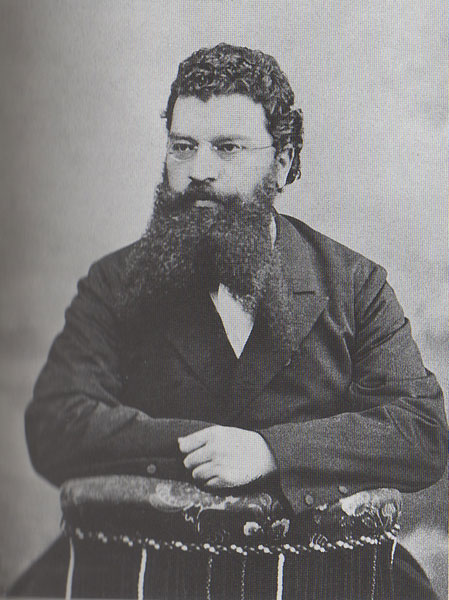 Луко Зоре, филолог (1846-1906)